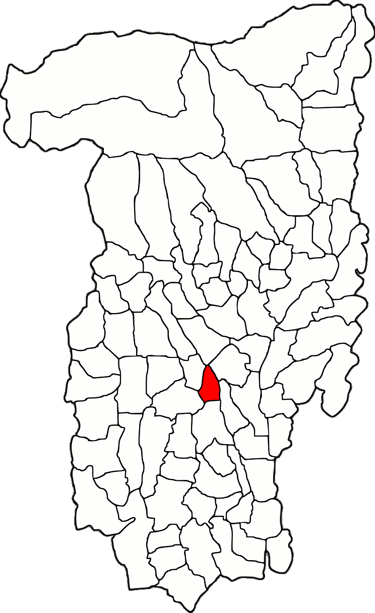 Lage der Gemeinde Pesceana im Kreis Vâlcea (RO).